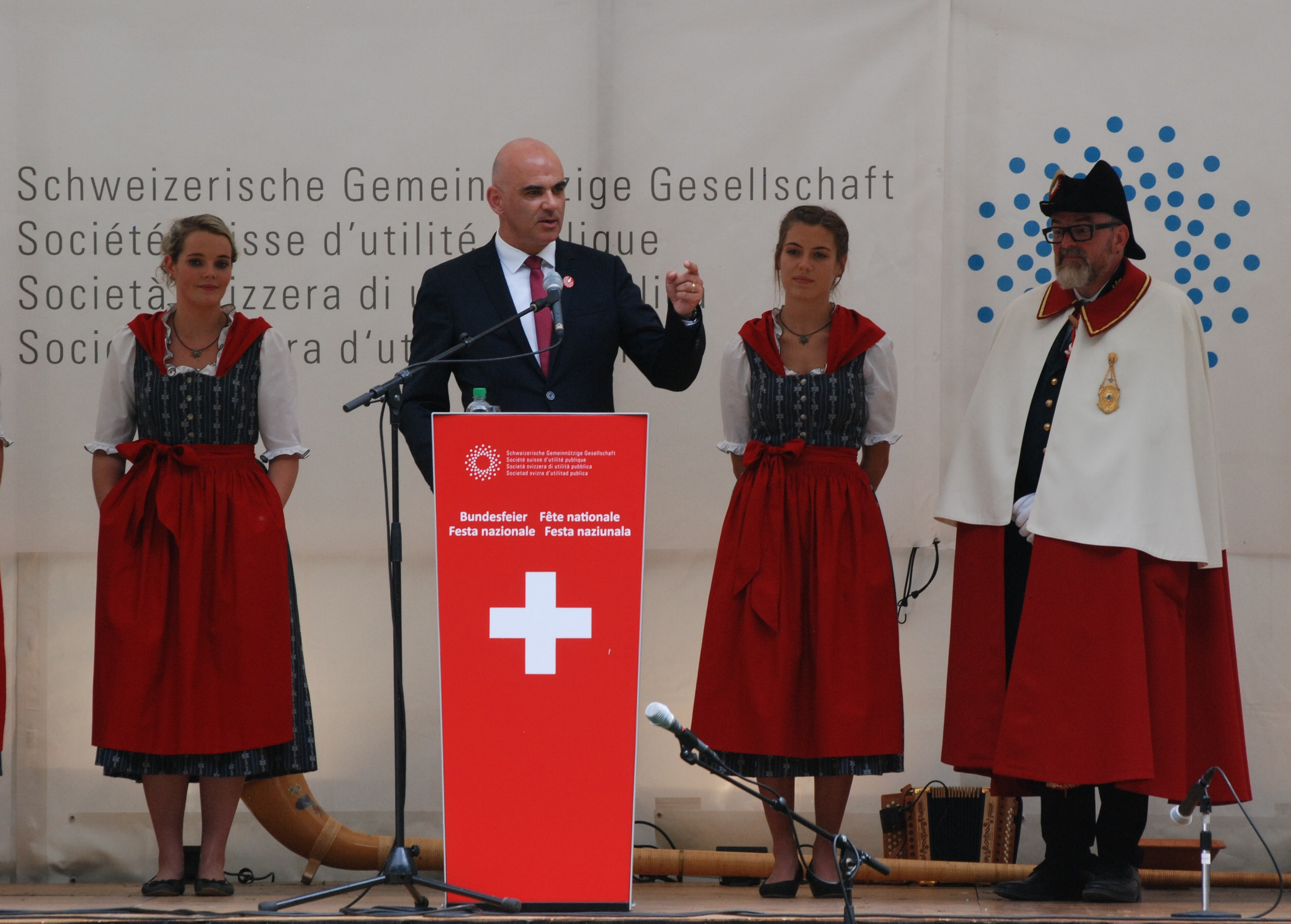 Bundespräsident Berset am 1. August 2018 bei seiner Ansprache auf dem Rütli